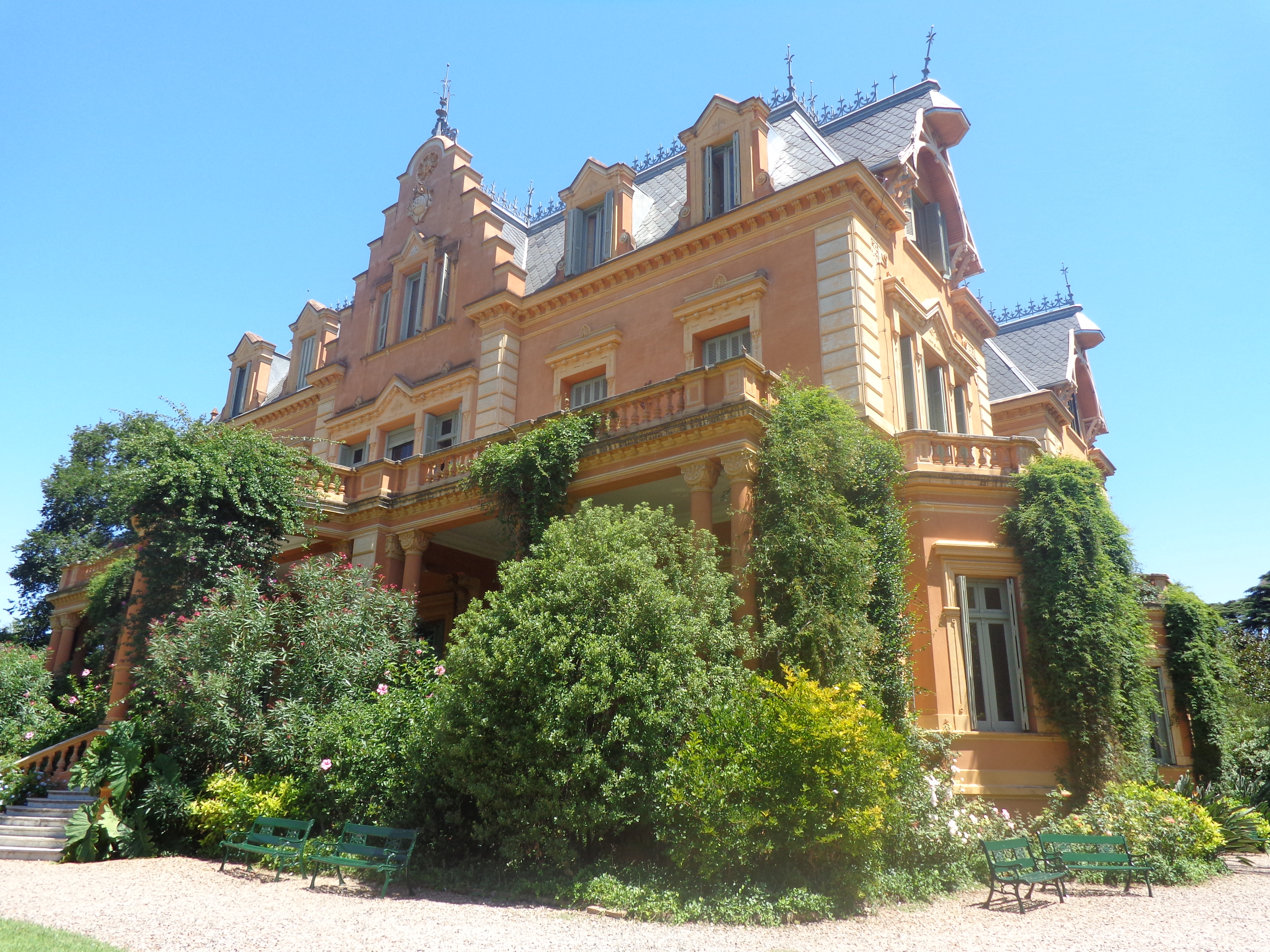 Casa que perteneció a la familia Ocampo (Victoria y Silvina). Elortondo 1837, Beccar. Buenos Aires, Argentina.